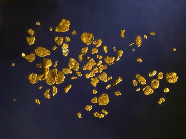 Waschgold aus der Schwarza